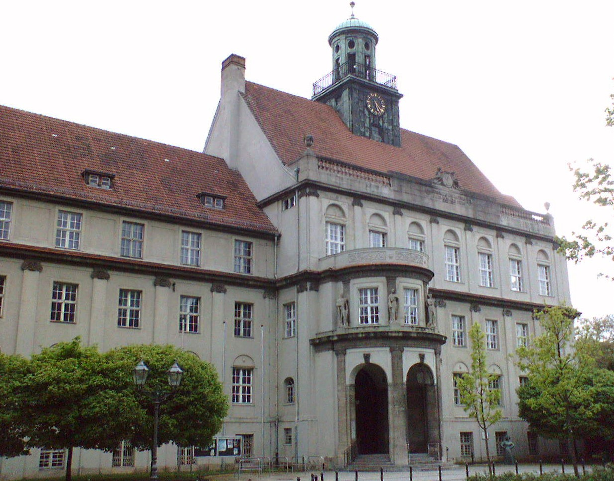 Rathaus Treptow, Ansicht